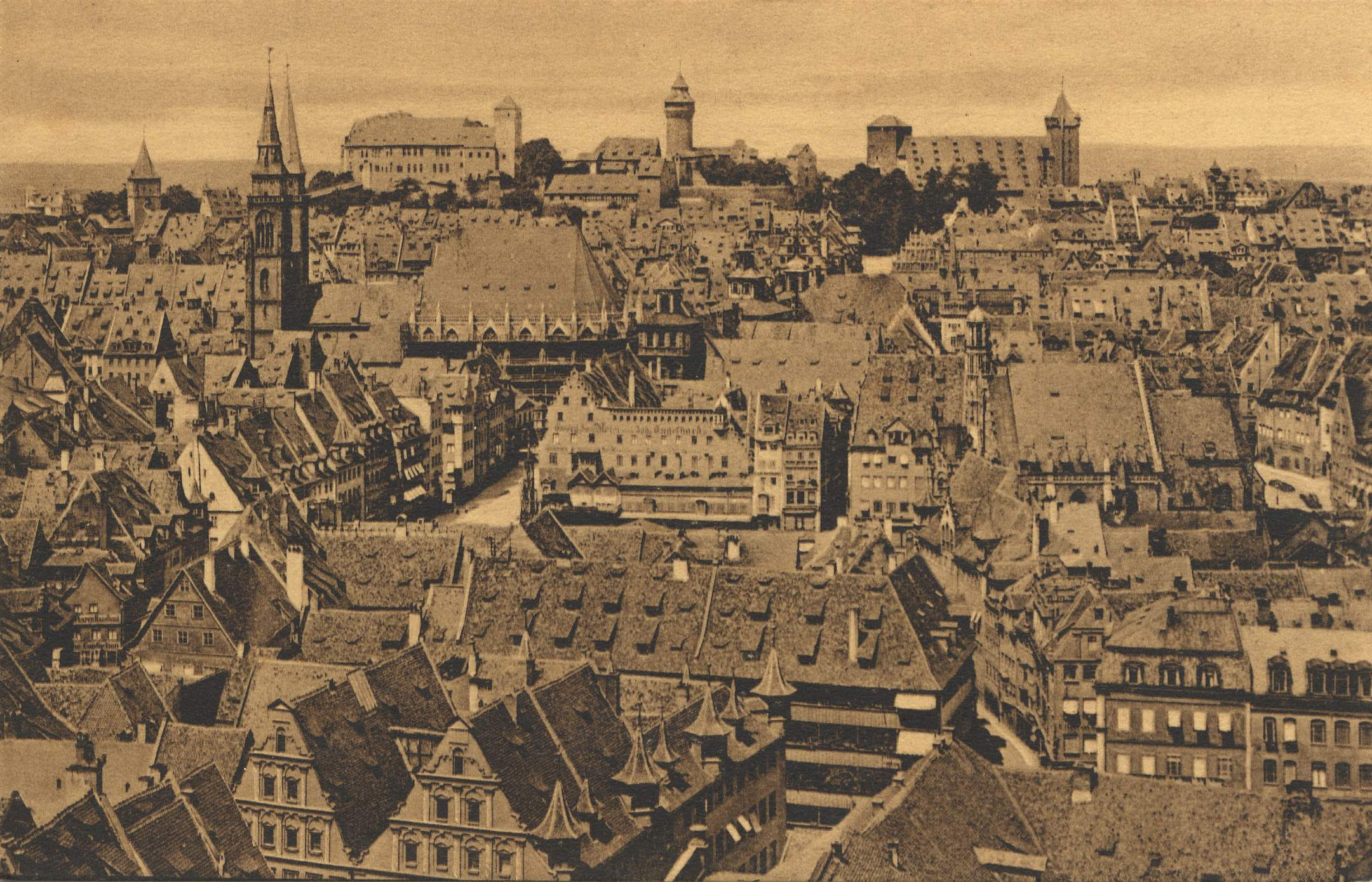 Nürnberg